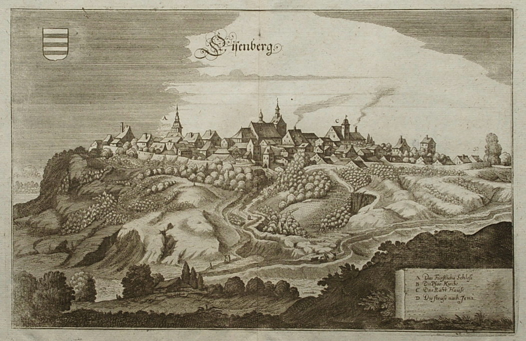 Kupferstich 20,5 x 32 cm aus Merians Topographie 1650